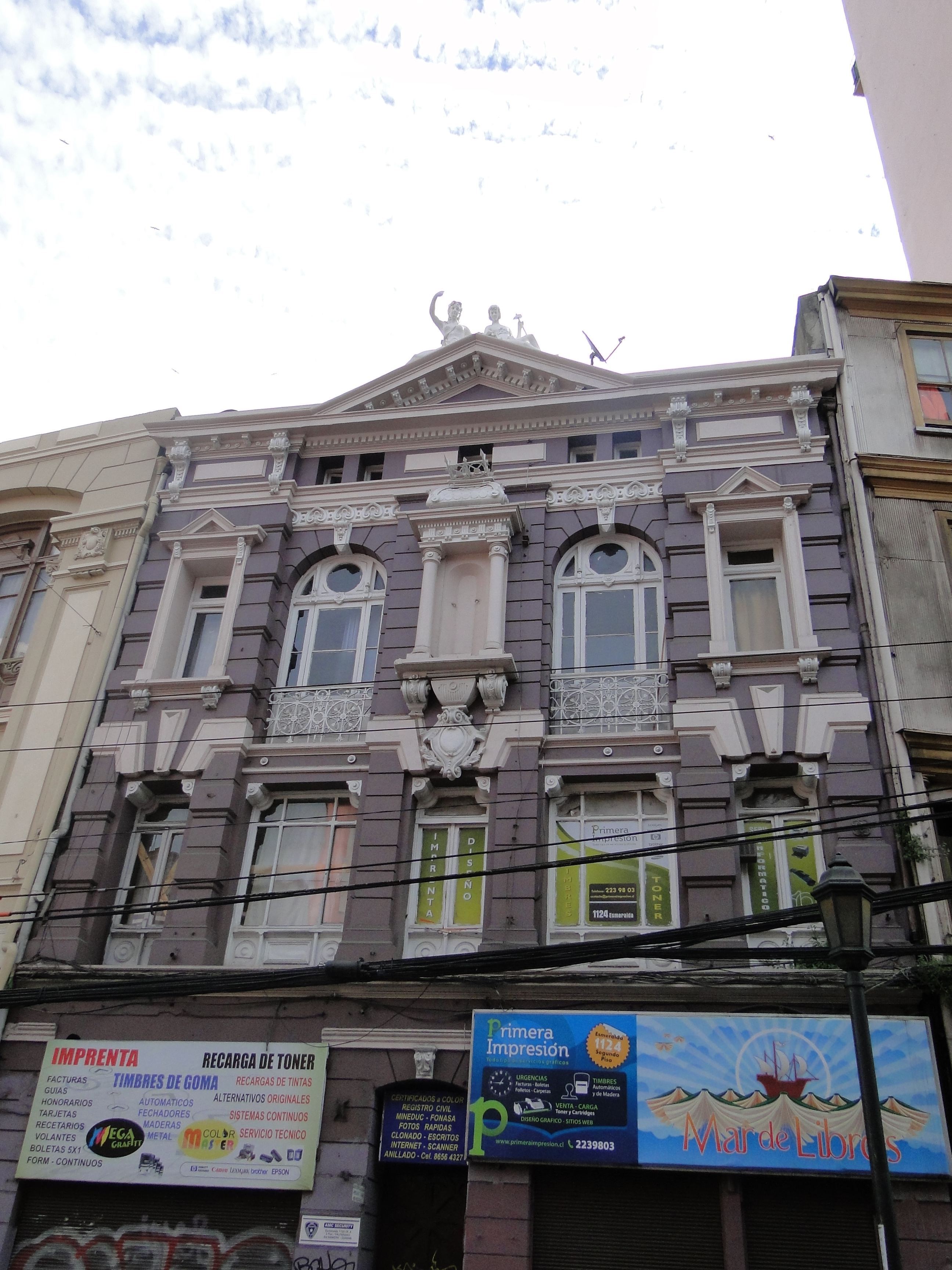 Edificio de calle Esmeralda Nº 1124 This is a photo of a national monument in Chile: 1154